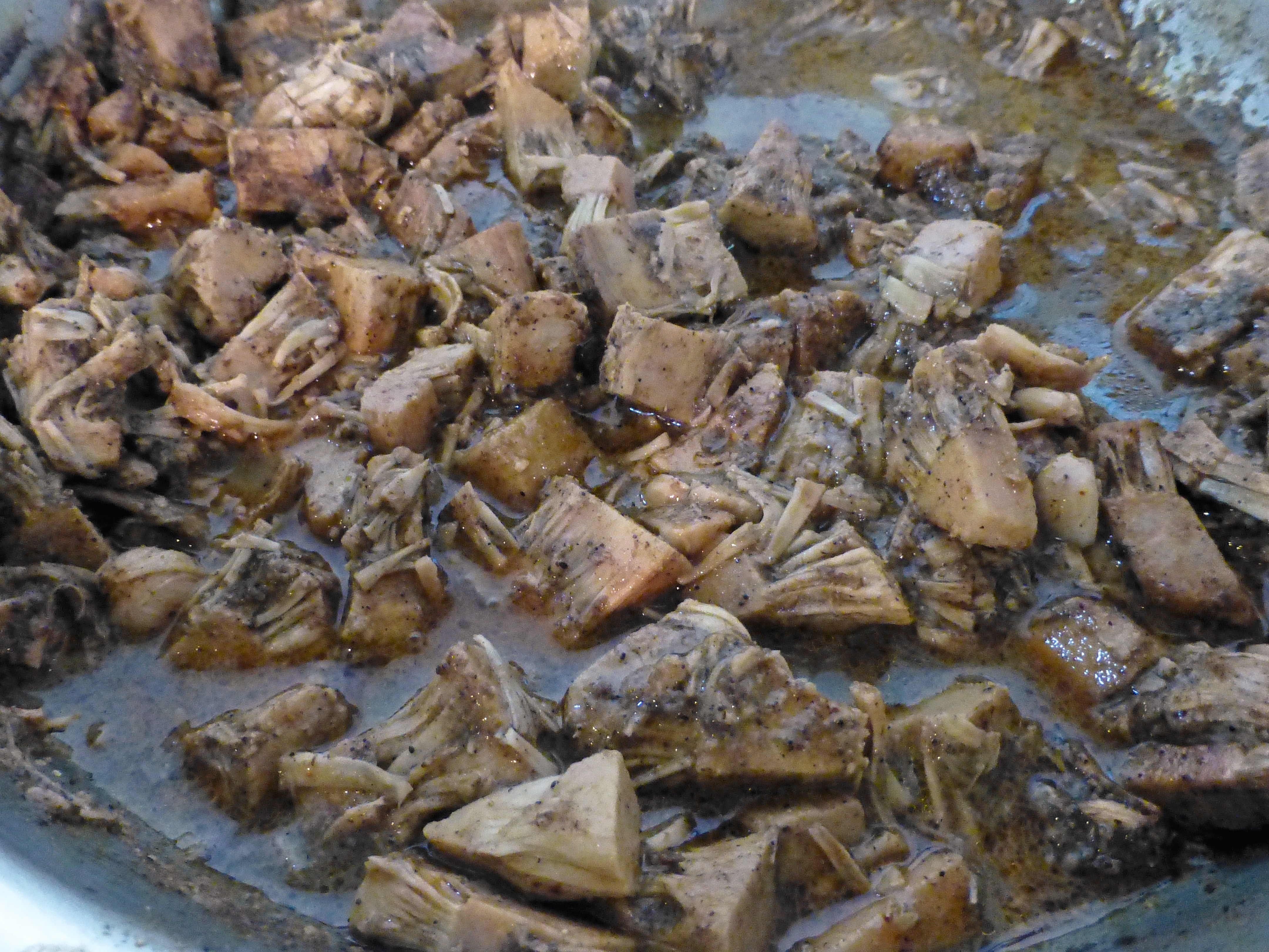 Baby jack fruit curry (Sri Lanka)